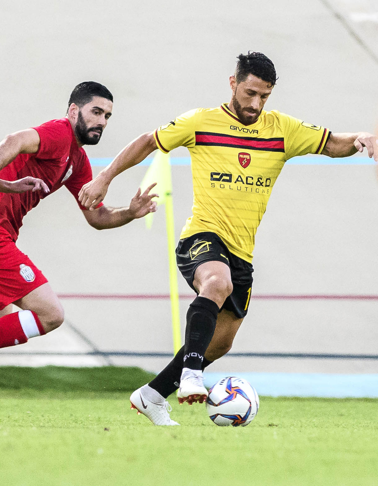 Ramiro Lago nel 2018 nella partita Folgore-Engordany nella partita di Europa League